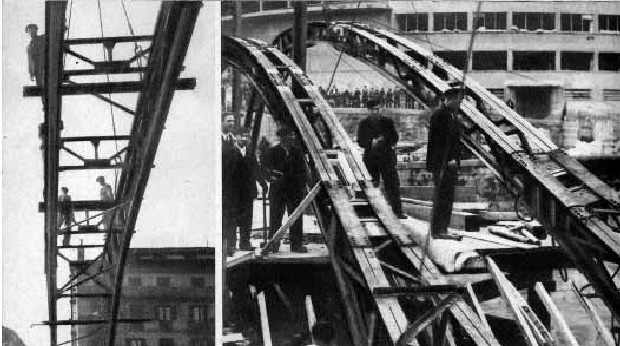 Areatzako zubiaren berreraikuntza 1937an